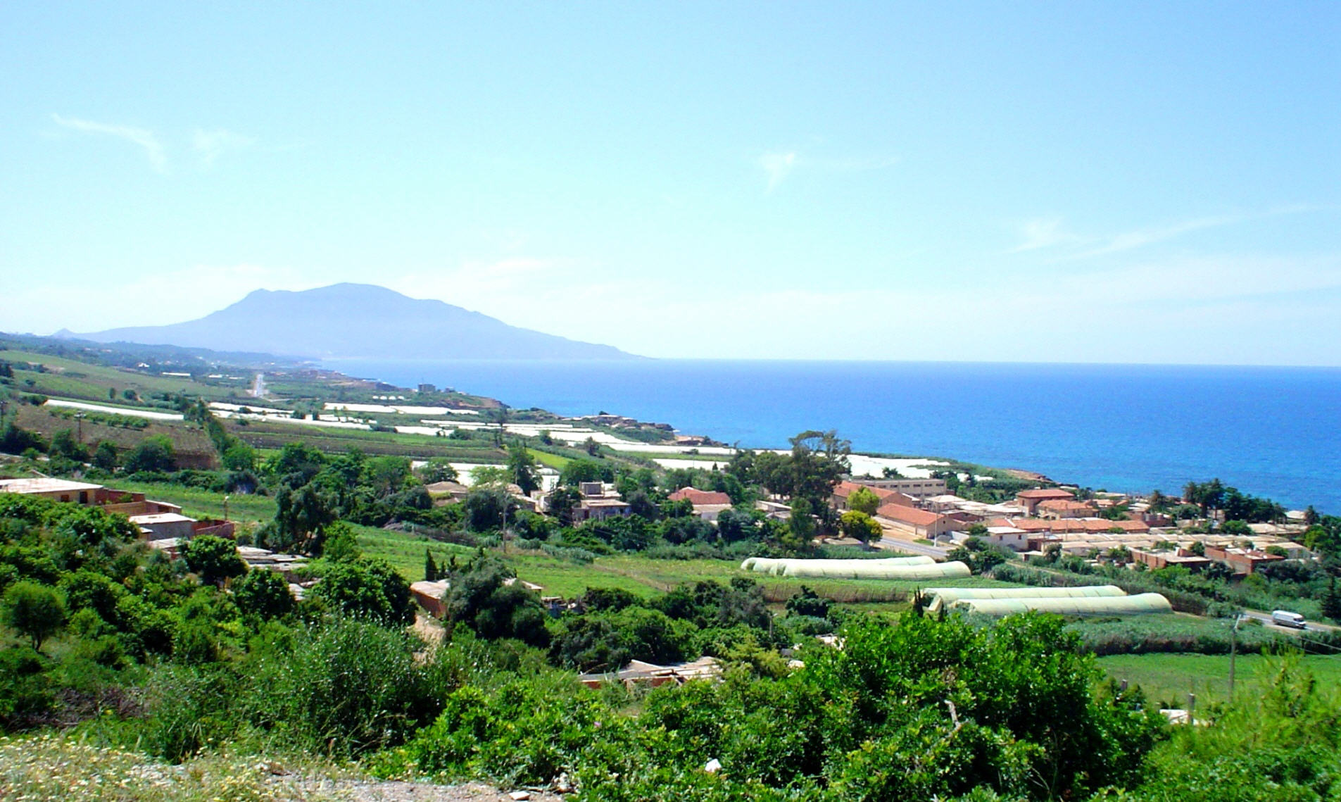 vers Tipaza